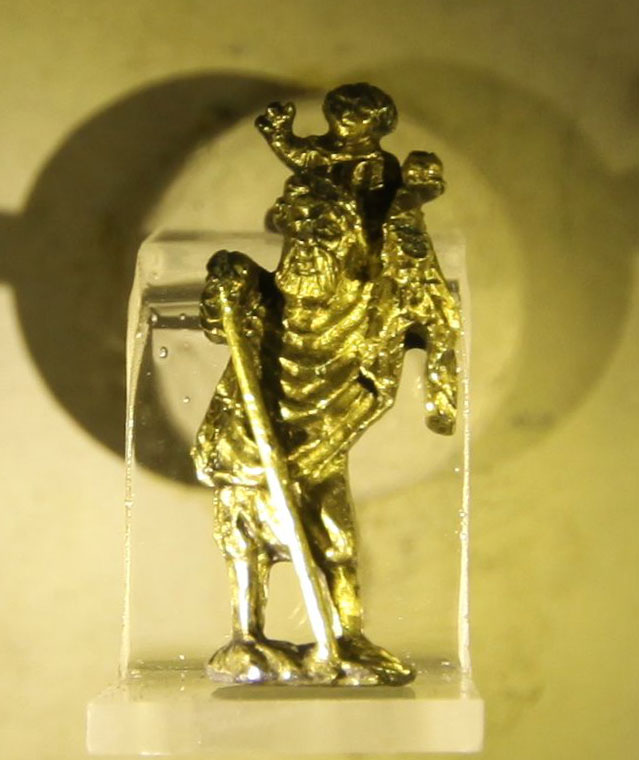 In Ihlow gefundene Figur des heiligen Christopherus.